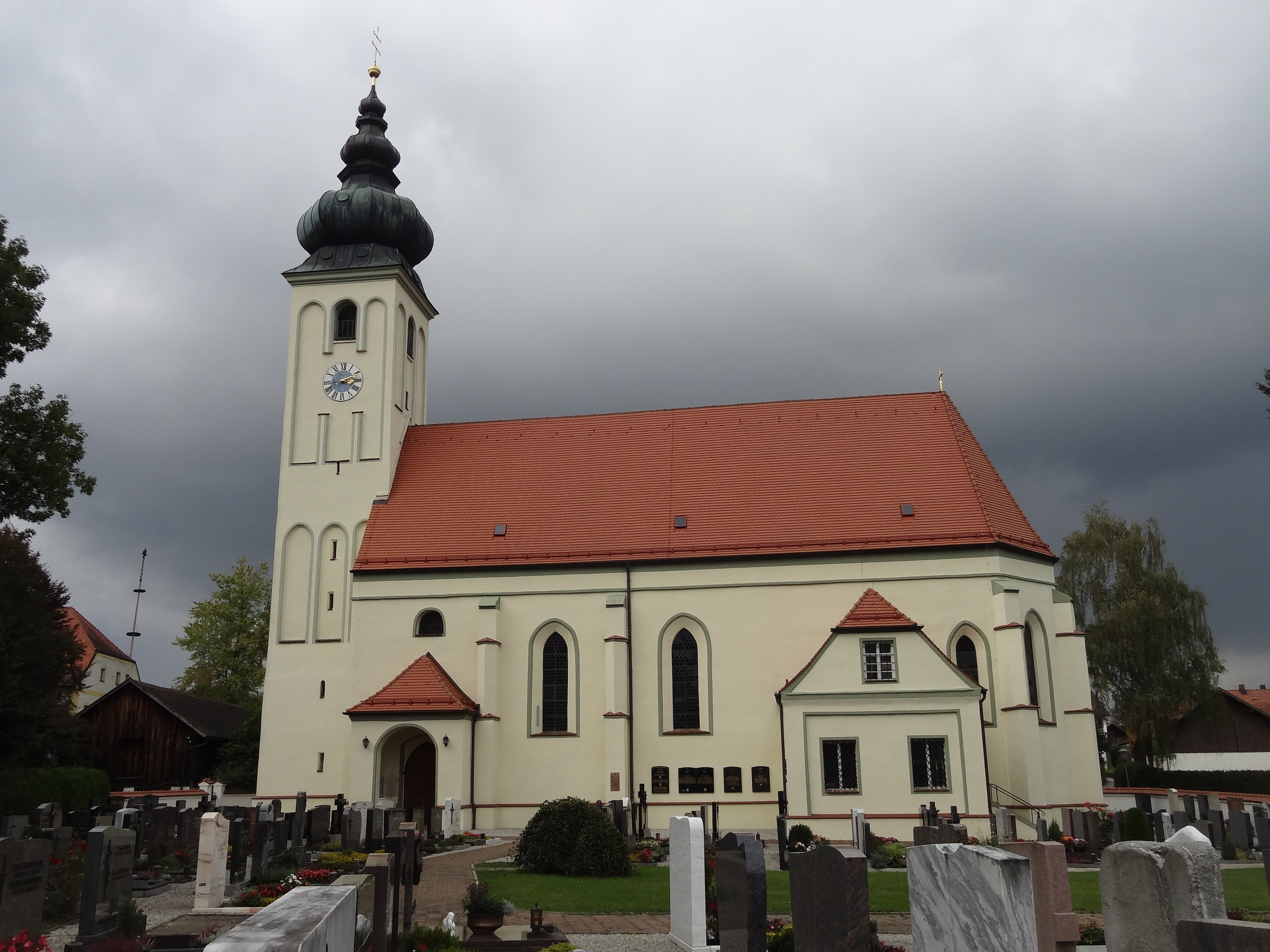 Außenansicht der Pfarrkirche St. Ulrich in Aich (Gde. Bodenkirchen), spätgotische Anlage mit barocker Zwiebelhaube